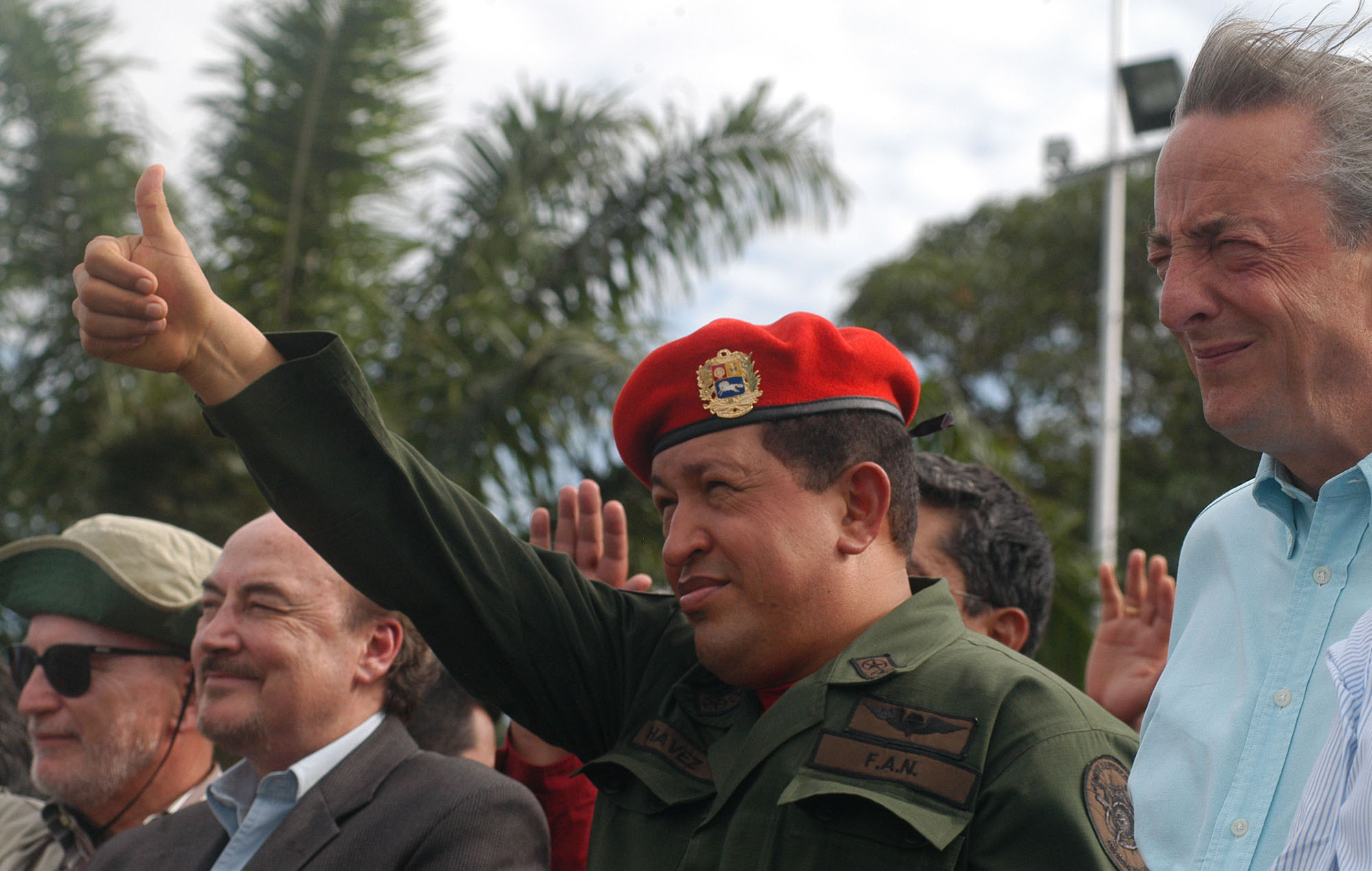 Hugo Chávez junto a los garantes de la "Operación Emmmanuel